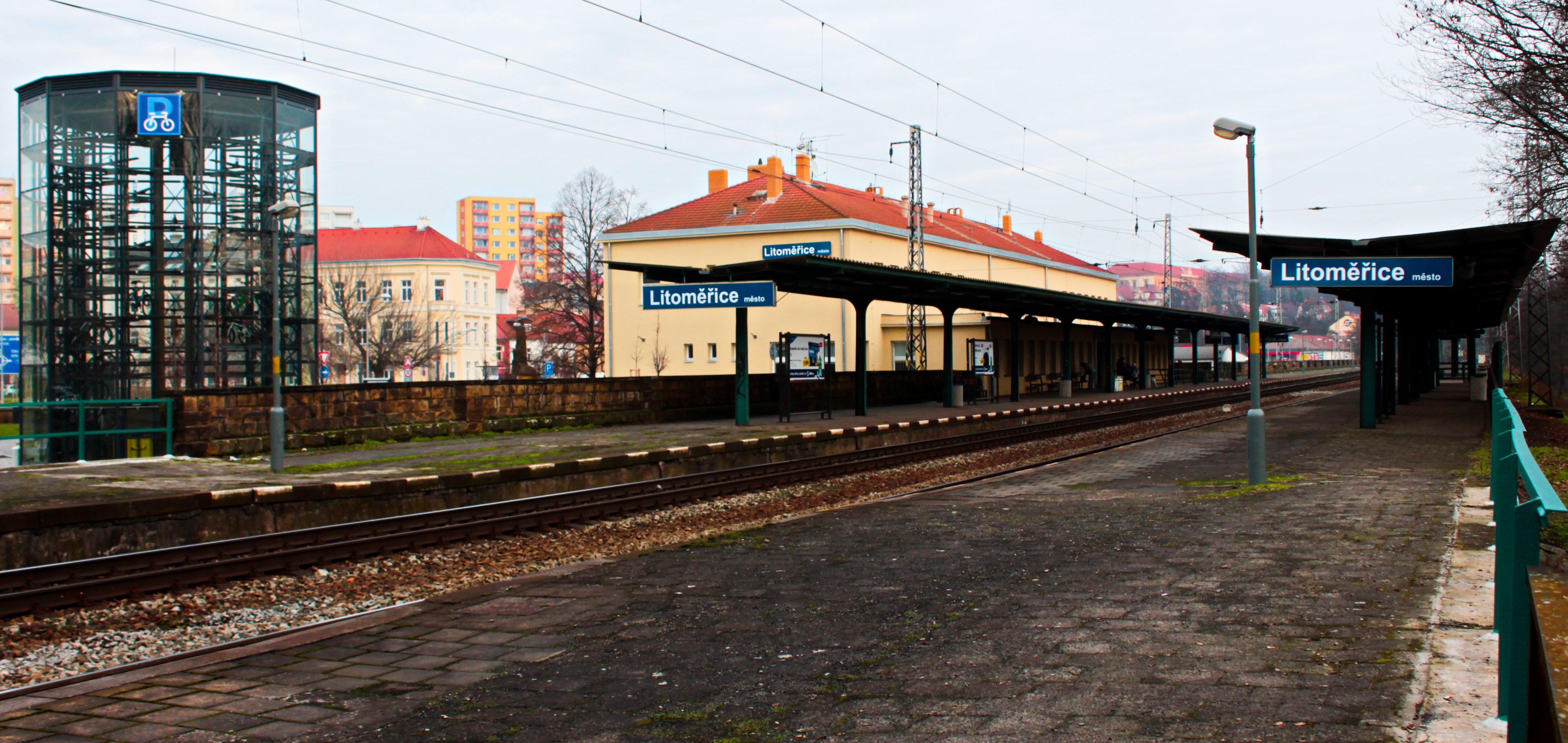 pohled na zastávku Litoměřice město, pořízeno z východního konce nástupiště č. 1